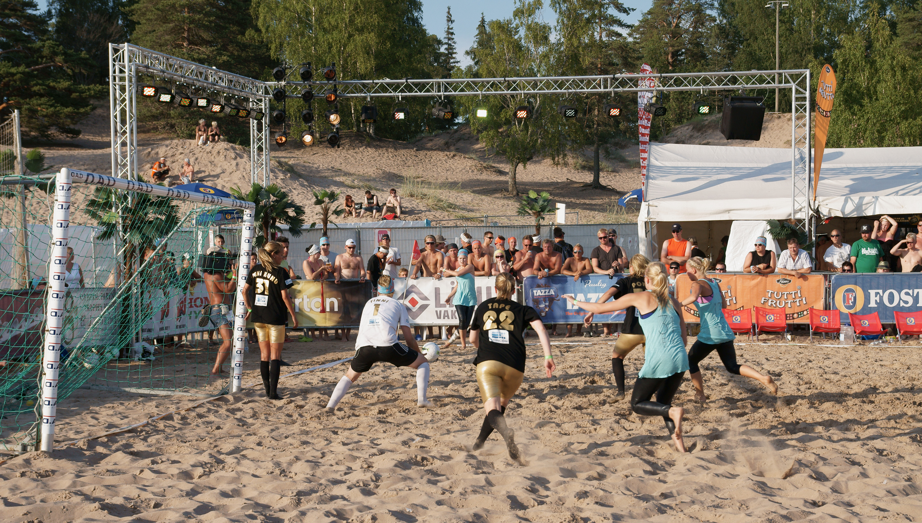 Yyterin Beachfutiksen naisten kilpasarjan finaali 2010: B.Sr vs. FC Gifu.